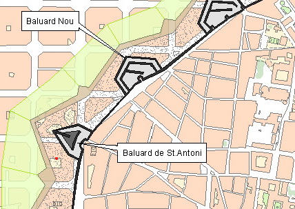 Projecció de l'antiga situació de la muralla i el baluard de Sant Antoni sobre l'illa on s'ubica el mercat de Sant Antoni